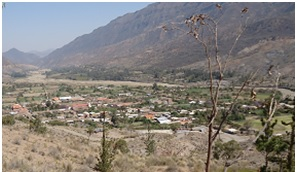 Vista general de la localidad de Pojo capital del unicipio del mismo nombre